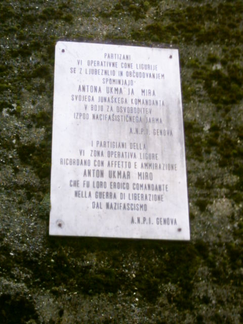 Lapide dedicata al partigiano triestino Anton Ukmar a Carrega Ligure dall'ANPI di Genova.